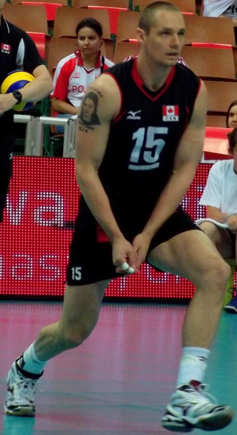 Zdjęcie zrobione podczas zawodów Ligi Światowej 2012 w katowickim Spodku.